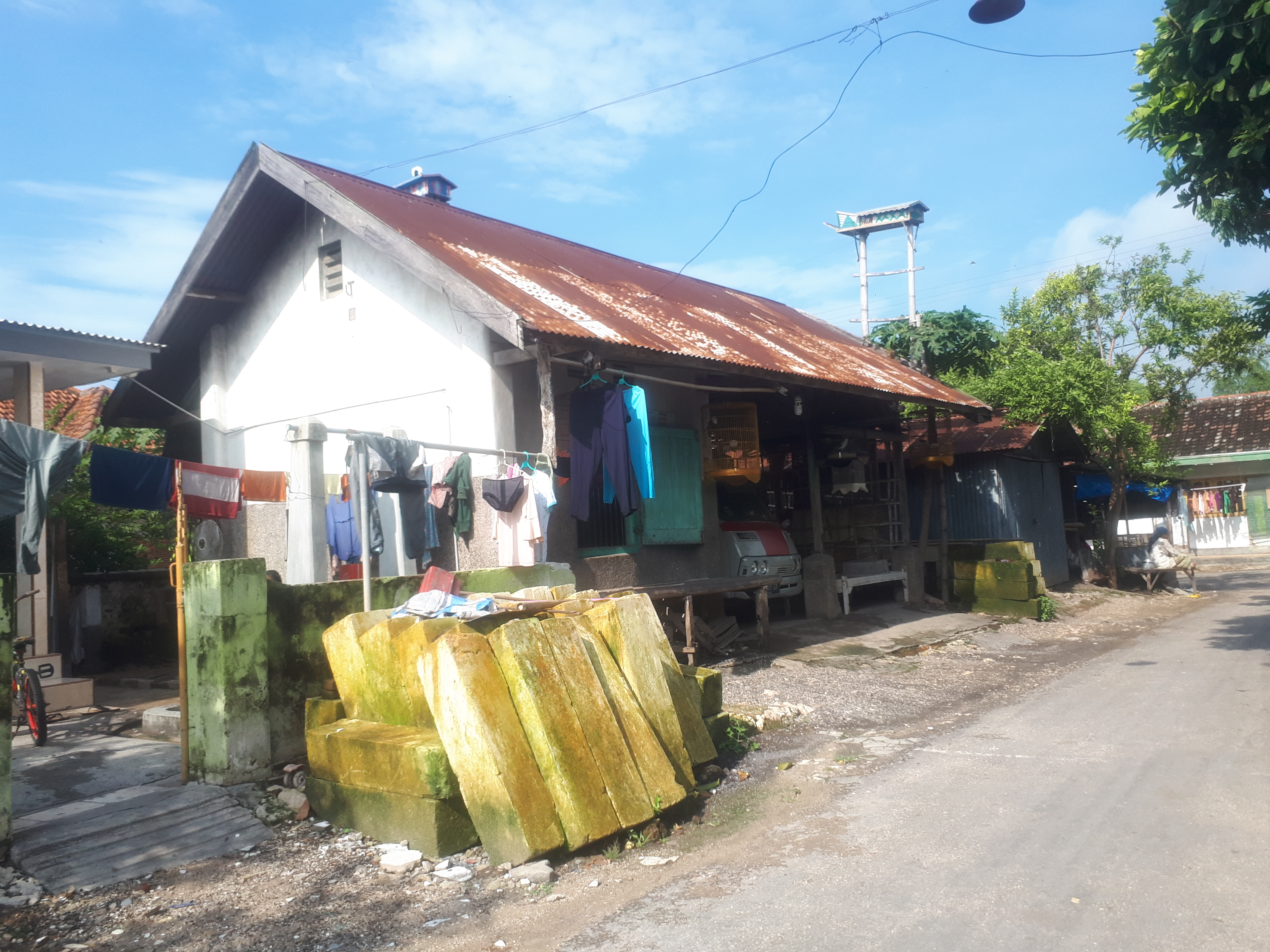 Stasiun Sukolilolama (SLL) merupakan salah satu stasiun non-aktif di Kabupaten Bangkalan. Stasiun yang terletak di Sukolilo Timur, Labang, Bangkalan ini diresmikan oleh Madoera Stoomtram Maatschappij